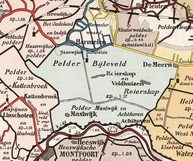 Polder Bijleveld